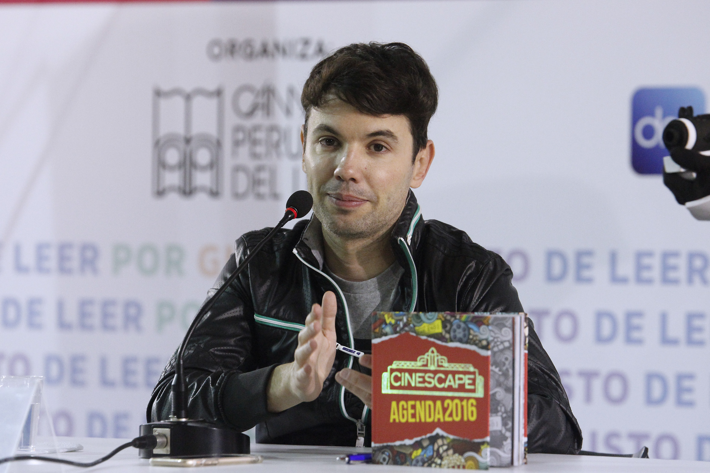 Bruno Pinasco en la Feria del Libro Ricardo Palma, 2015. Presentación de Agenda Cinescape 2016.